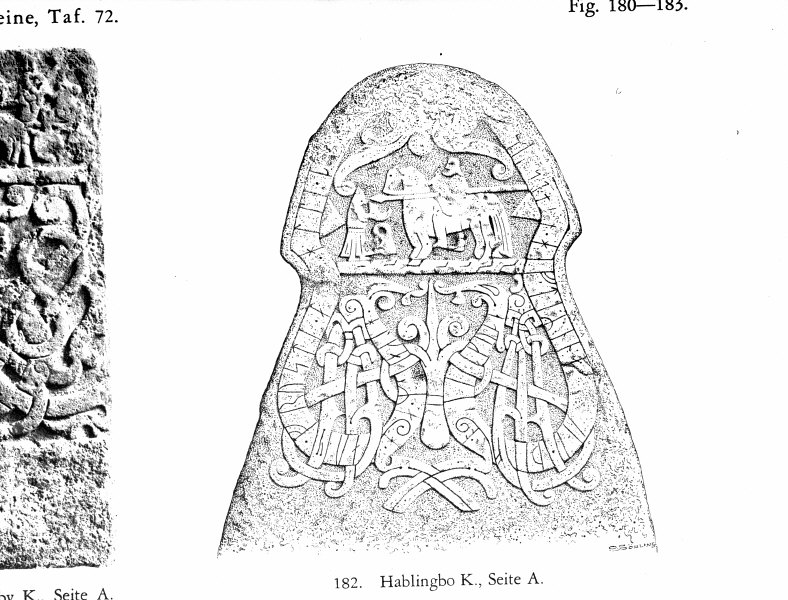 Bildsten, foto efter teckning av Olof Sörling. Kategori: (09) Runstenar, bildstenar Bildsten, foto efter teckning av Olof Sörling.